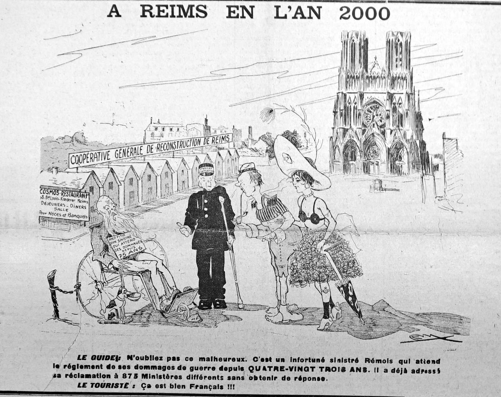 hebdomadaire humoristique et satirique.